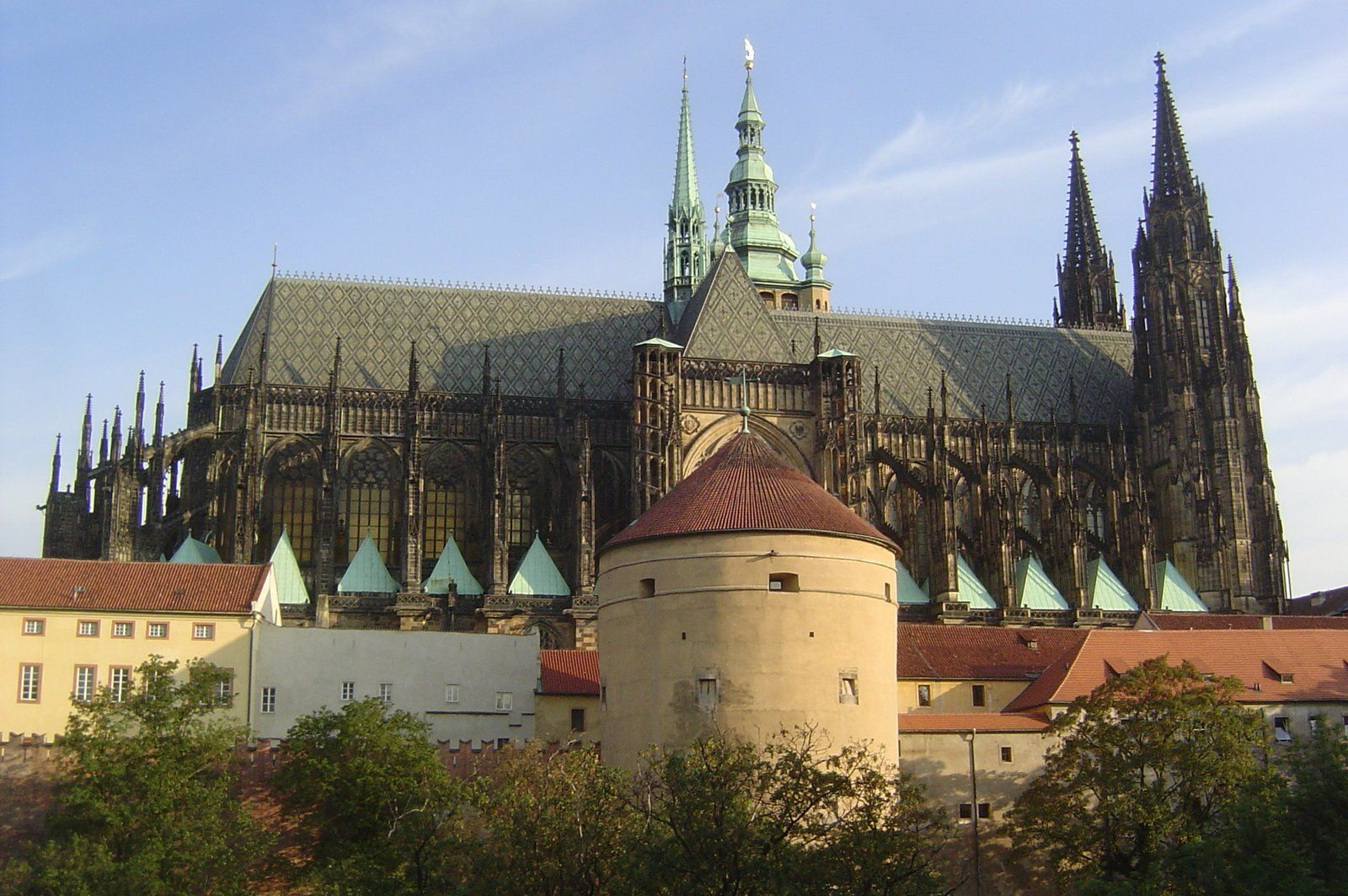 Pražský hrad - Mihulka a chrám svatého Víta